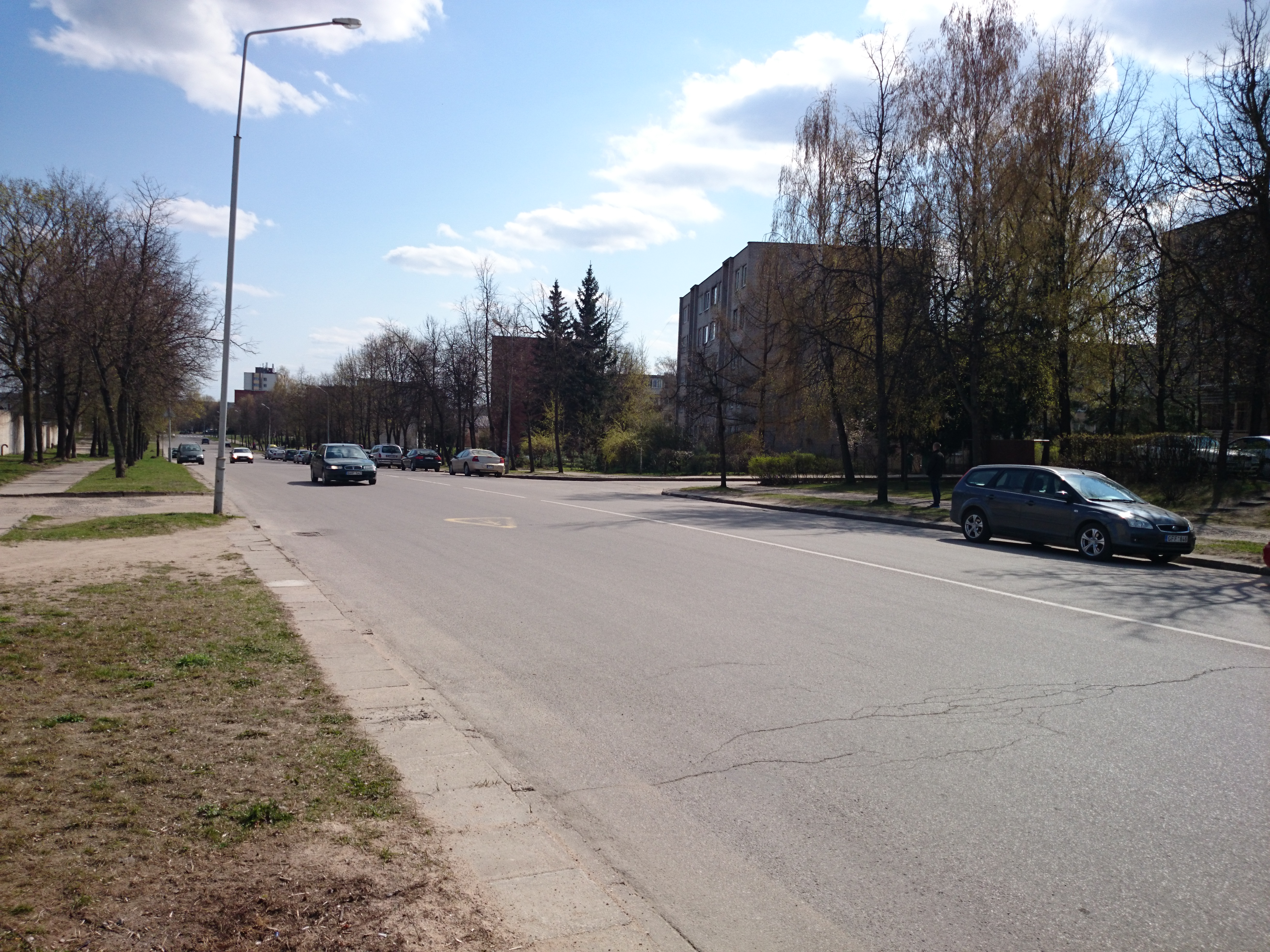 Lietava street